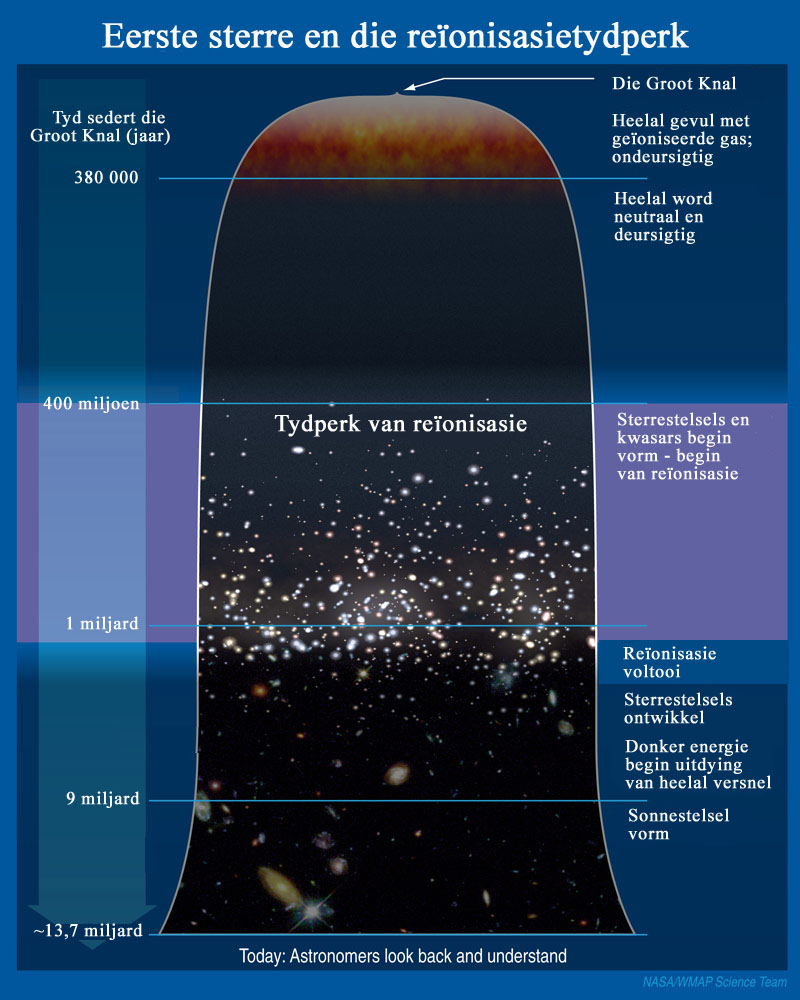 Die tydperk van reïonisasie